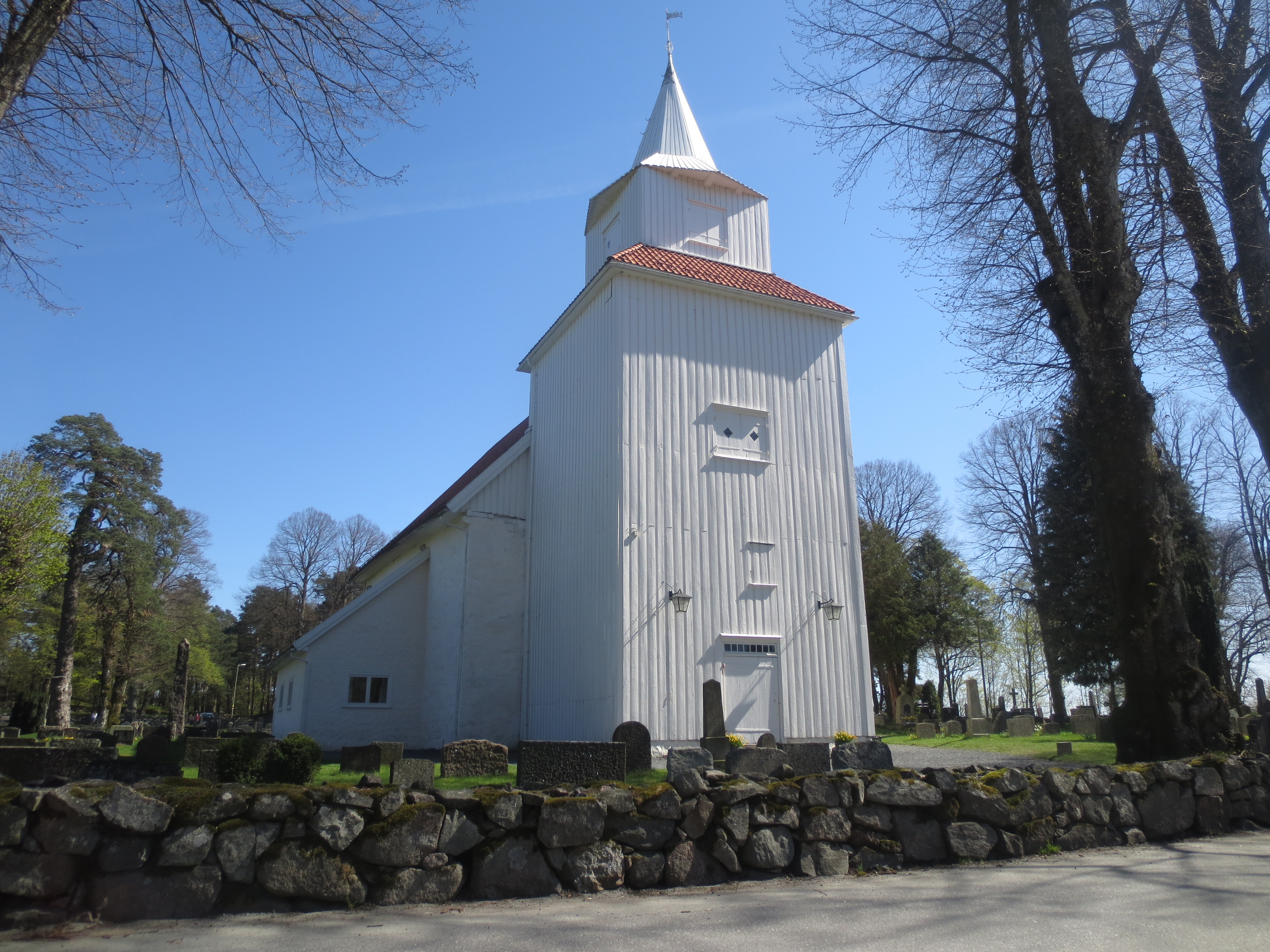 Middelalderkirken i Fjære, Grimstad (Aust-Agder). Kirken er kjent fra diktet om Terje Vigen, og er et viktig middelalderbygg på Sørlandet.